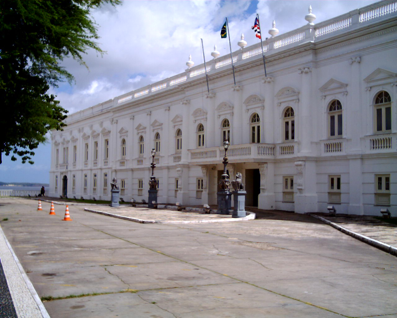 Sede do Governo do Estado